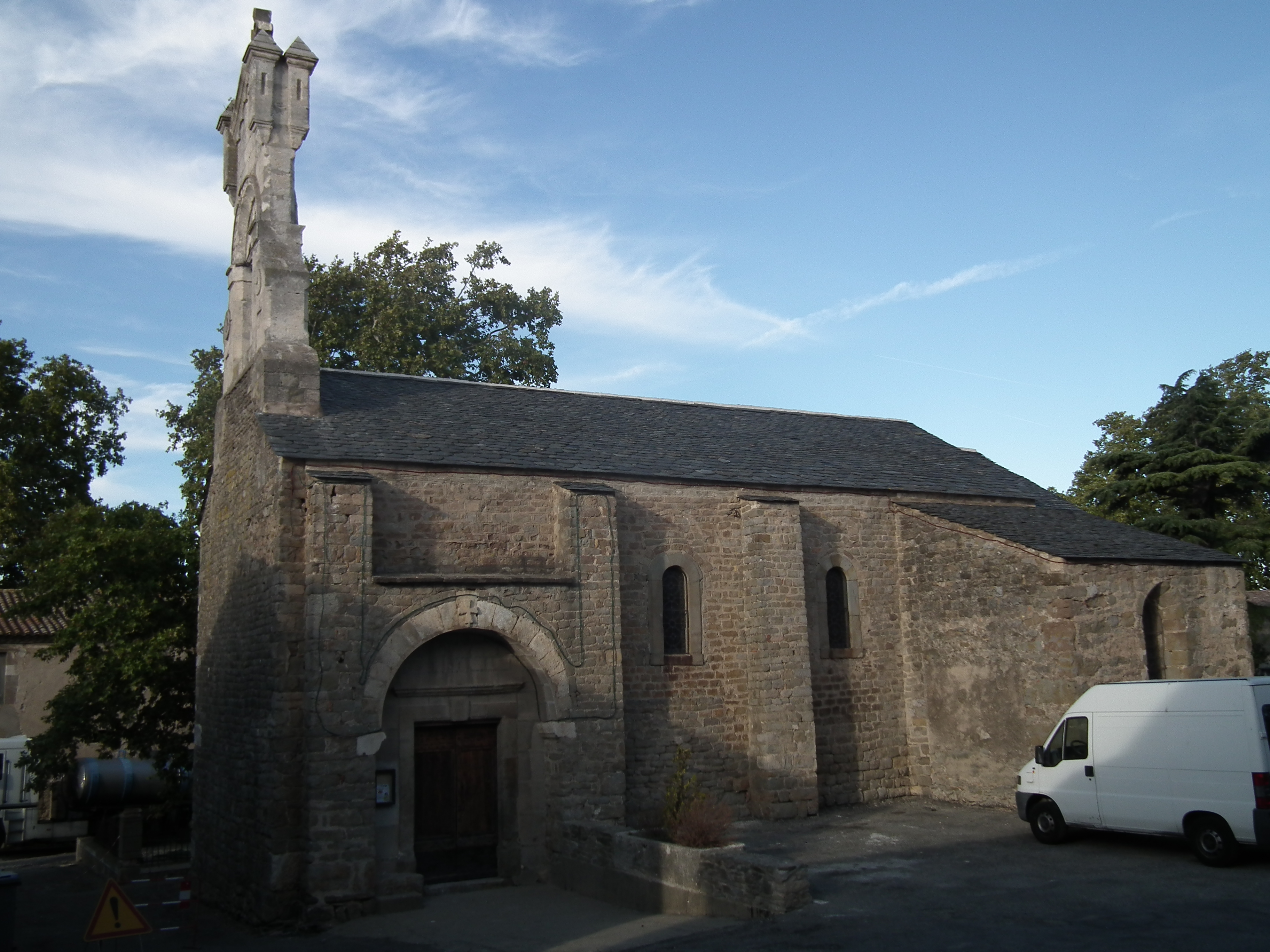 Localisation :Saint-Couat-d'Aude 43°12'11"N 2°37'50"E .